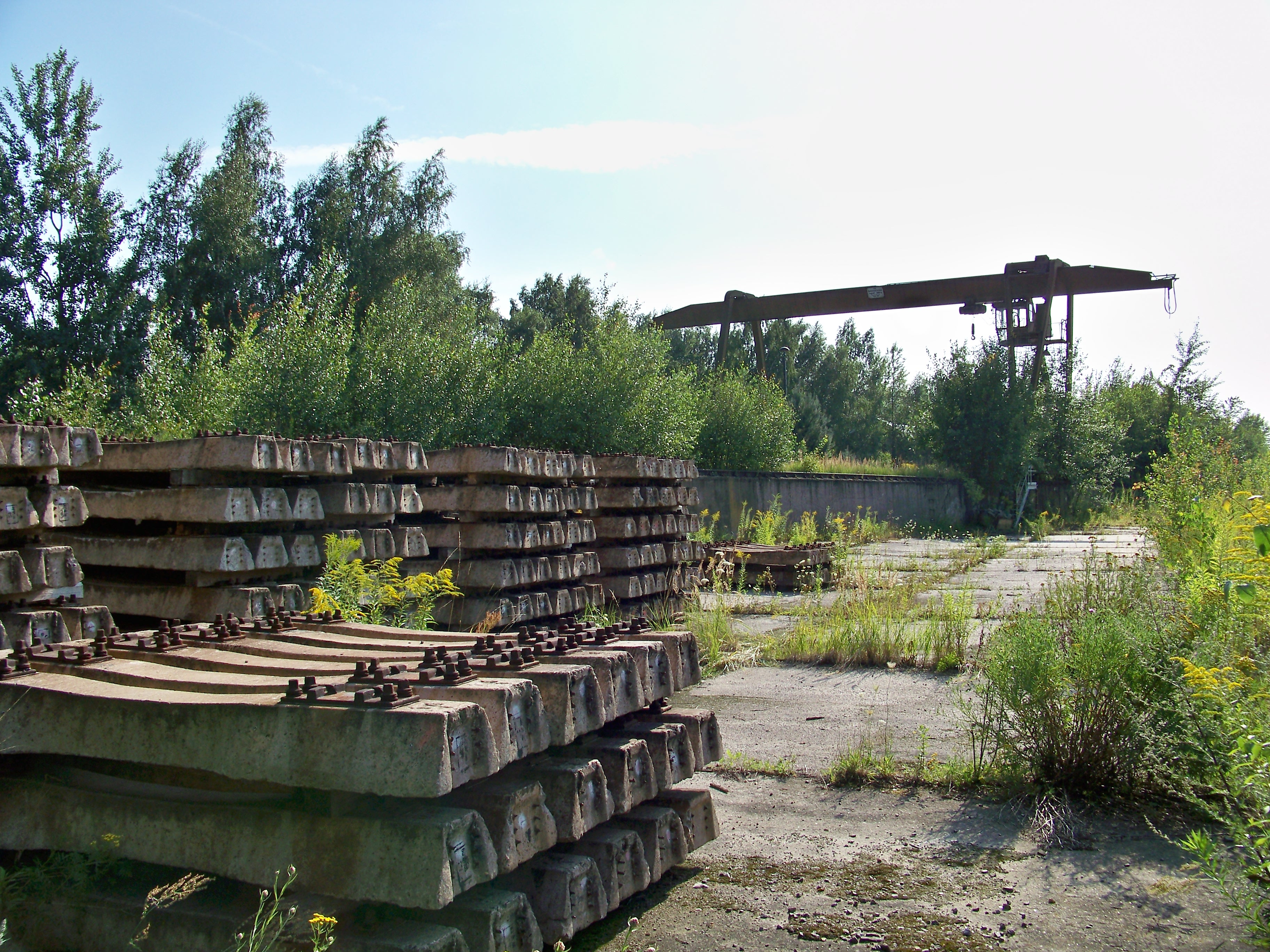 Anlagen der Anschlussbahn der Sächsischen Quarzporphyrwerke - Werke Frauenberg.